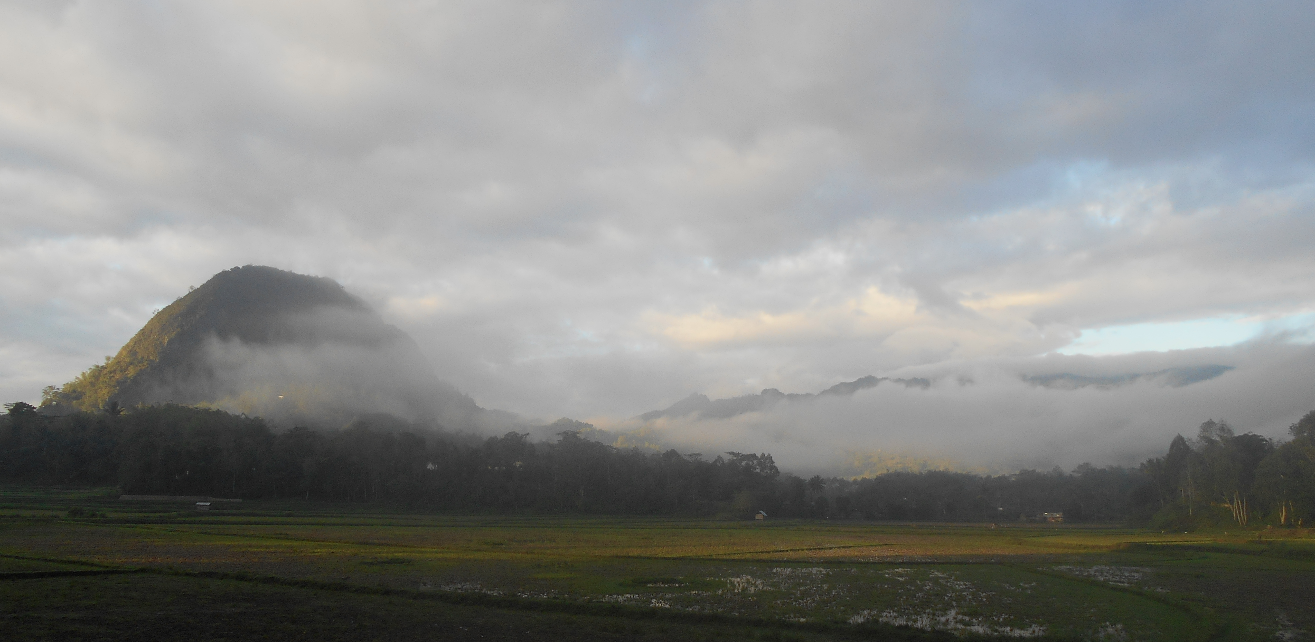 Gunung Tinoring Berada di Kecamatan Mengkendek berhadapan dengan Gunung Kandora